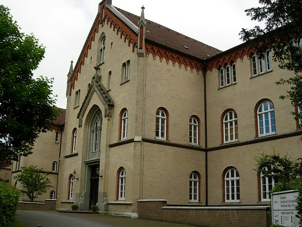 Altes Krankenhaus in Altona-Altstadt. 1855–1861 erbaut durch Heinrich Oswald Winkler.This is a photograph of an architectural monument.